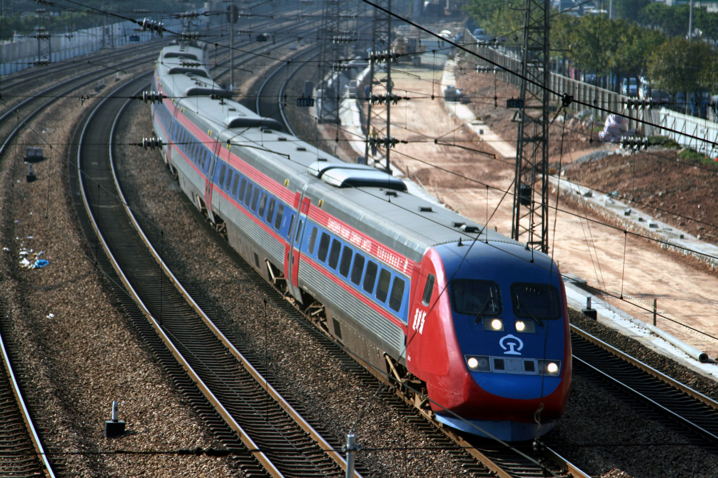 X2000（新时速）列车于广深铁路